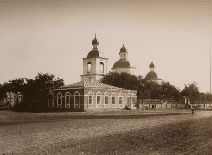 Старая Покровская церковь в Ростове-на-Дону